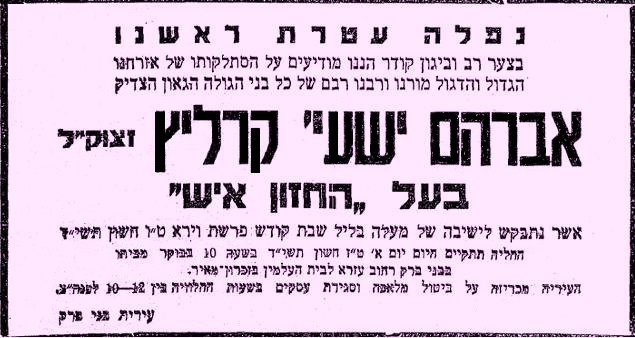 מודעת אבל שפרסמה עיריית בני ברק בעיתונות ביום הלויית החזון איש